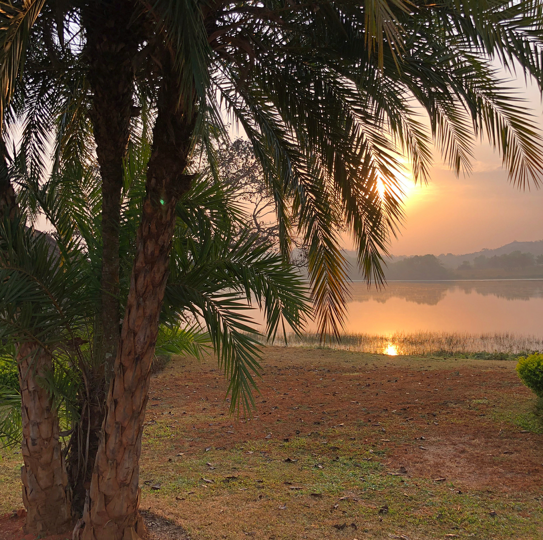 Coucher de soleil, Kouoptamo, Petpenoun, Région de l'Ouest, Cameroun